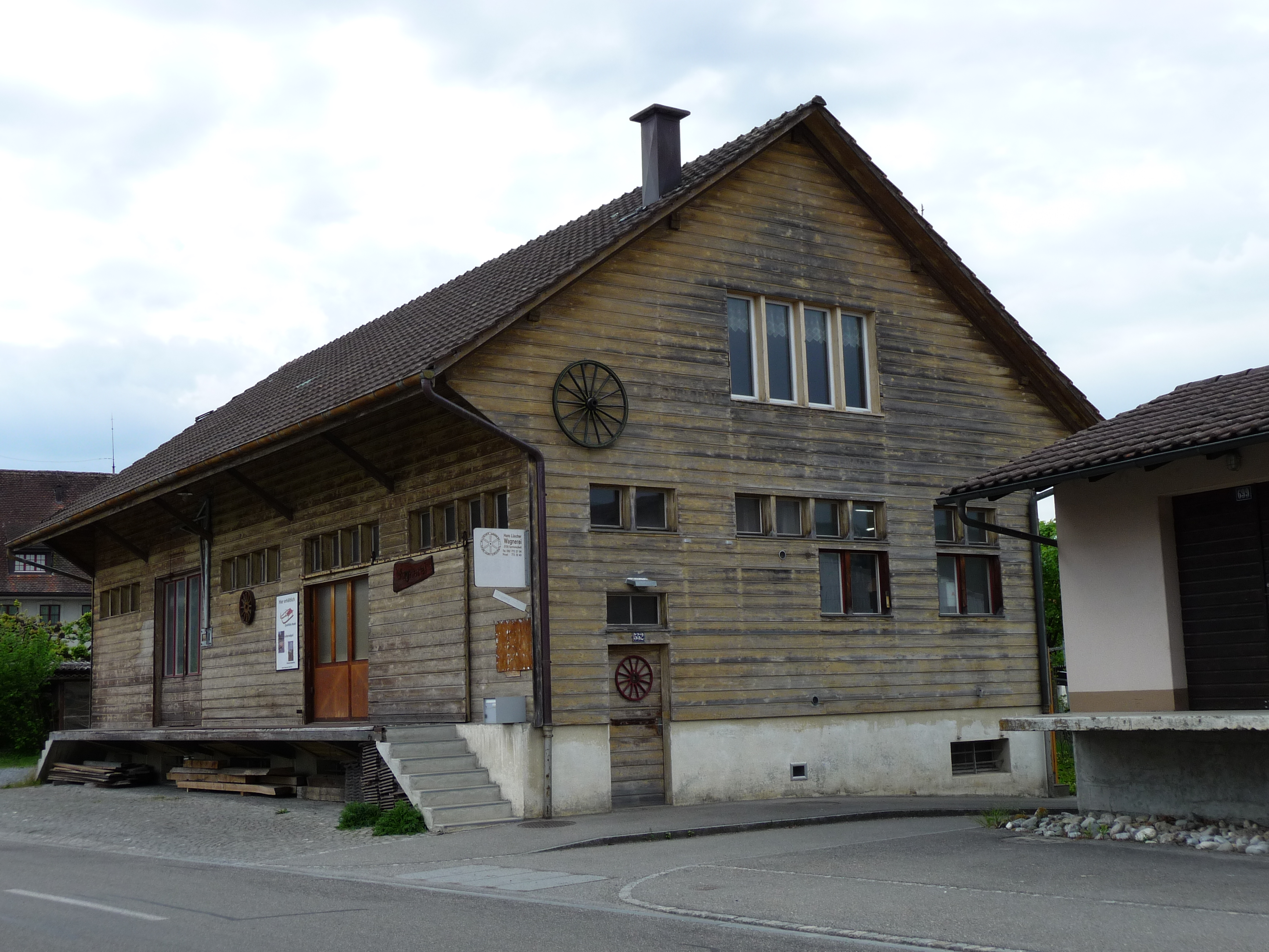 Alte Wagnerei in Gontenschwil